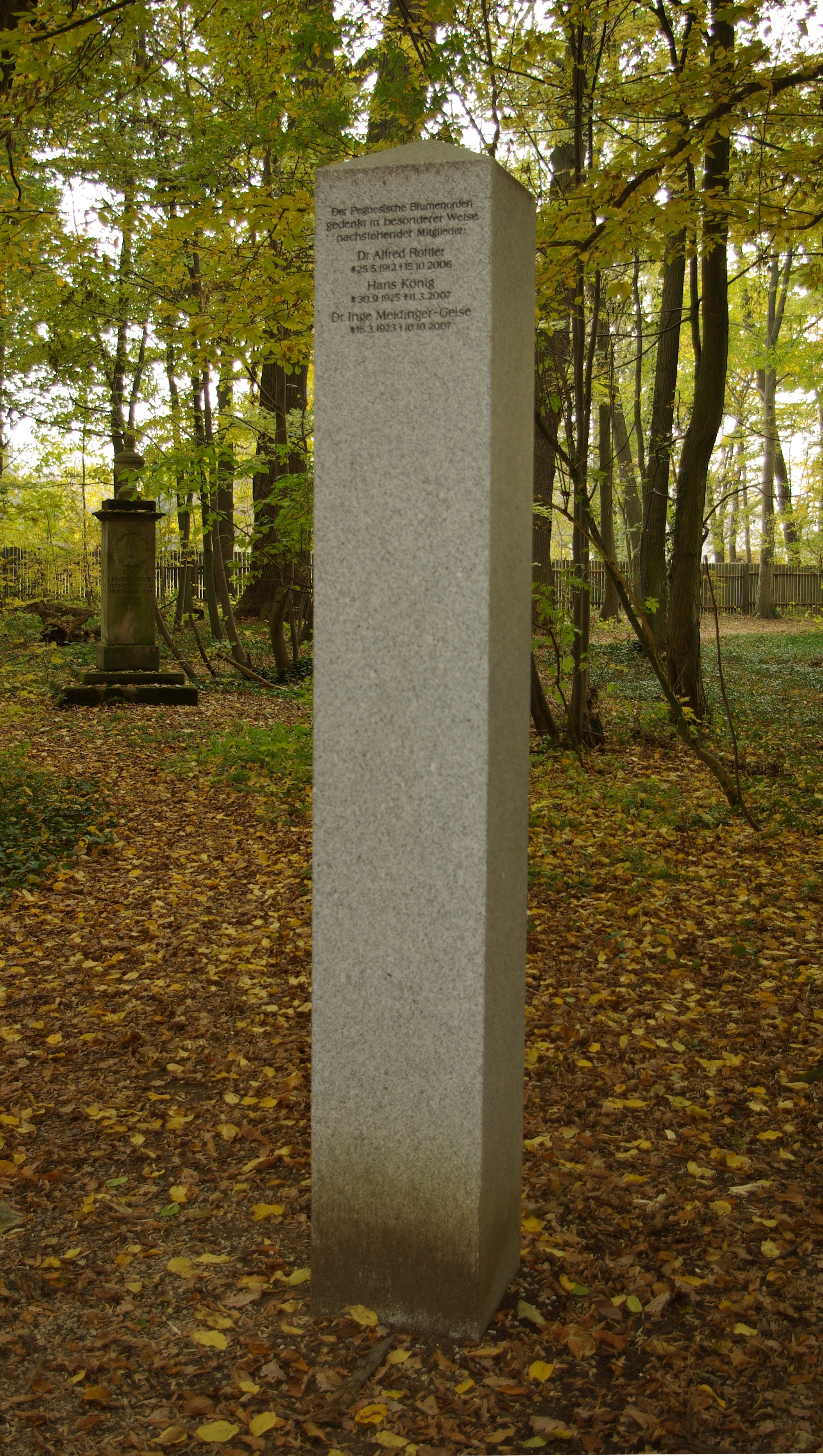 Gedenkstein für Alfred Rottler, Hans König und Inge Meidinger-Geise im Irrhain bei Kraftshof. Dieser Teil der Anlage wurde als Scheinfriedhof gestaltet.